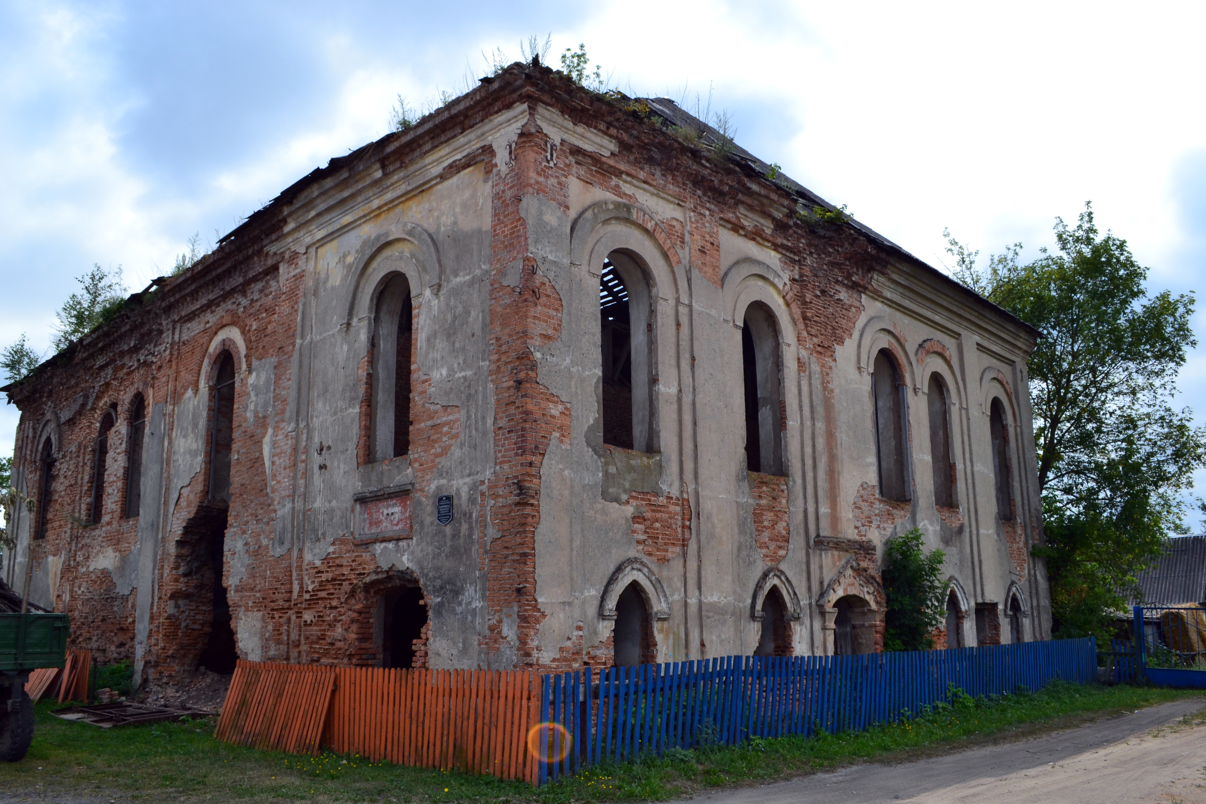 Беларуская (тарашкевіца): Ружанская сынагога This is a photo of Belarusian heritage monument. Reference number: 113Г000645 ( WLM)